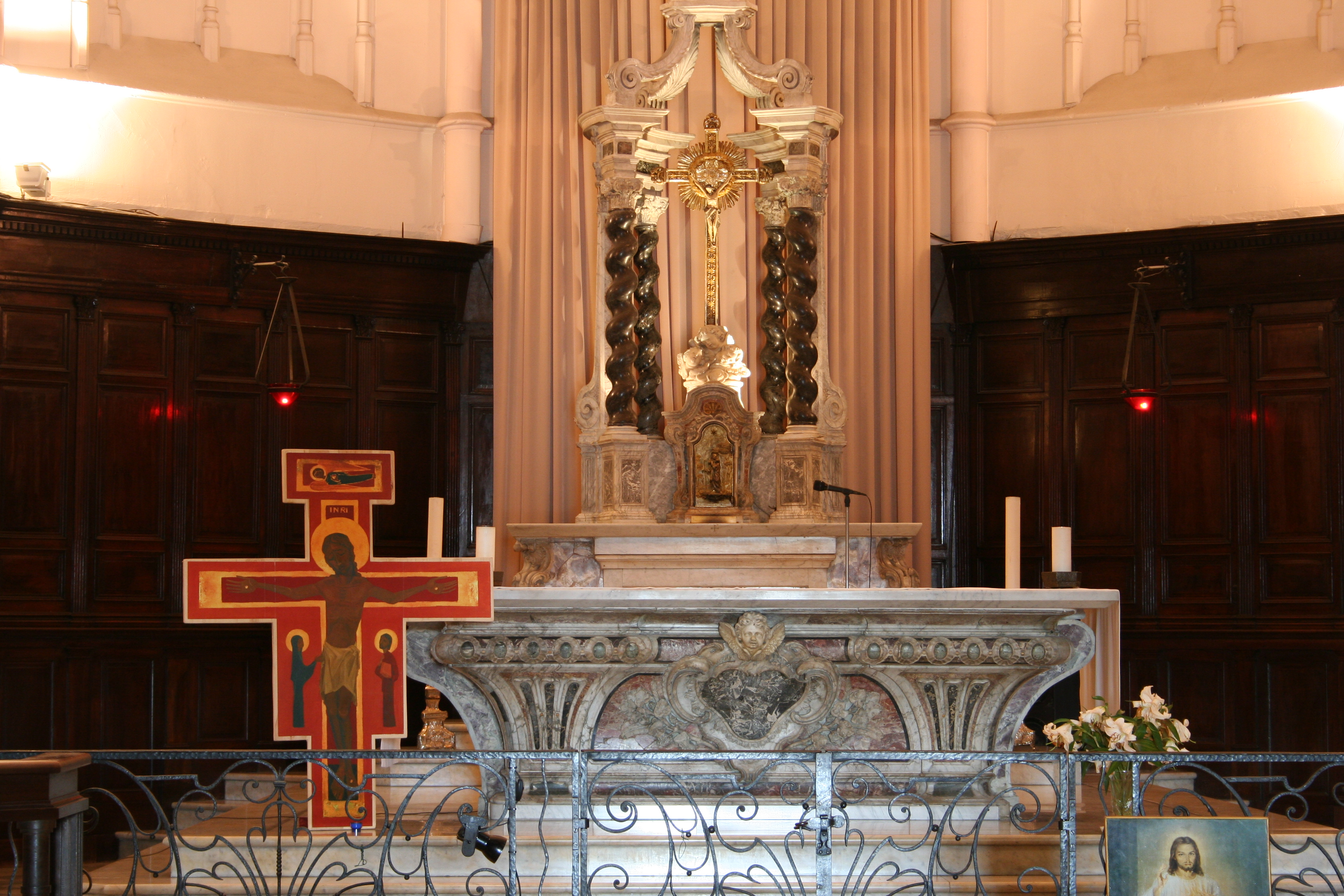 Église Saint-Ferréol les Augustins à Marseille. Autel sculpté par Fossati.